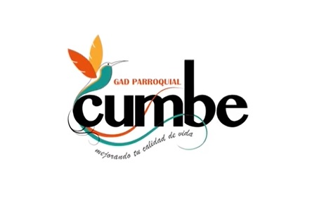 Logo de el Gobierno Autónomo Descentralizado de la parroquia San Luis de Cumbe